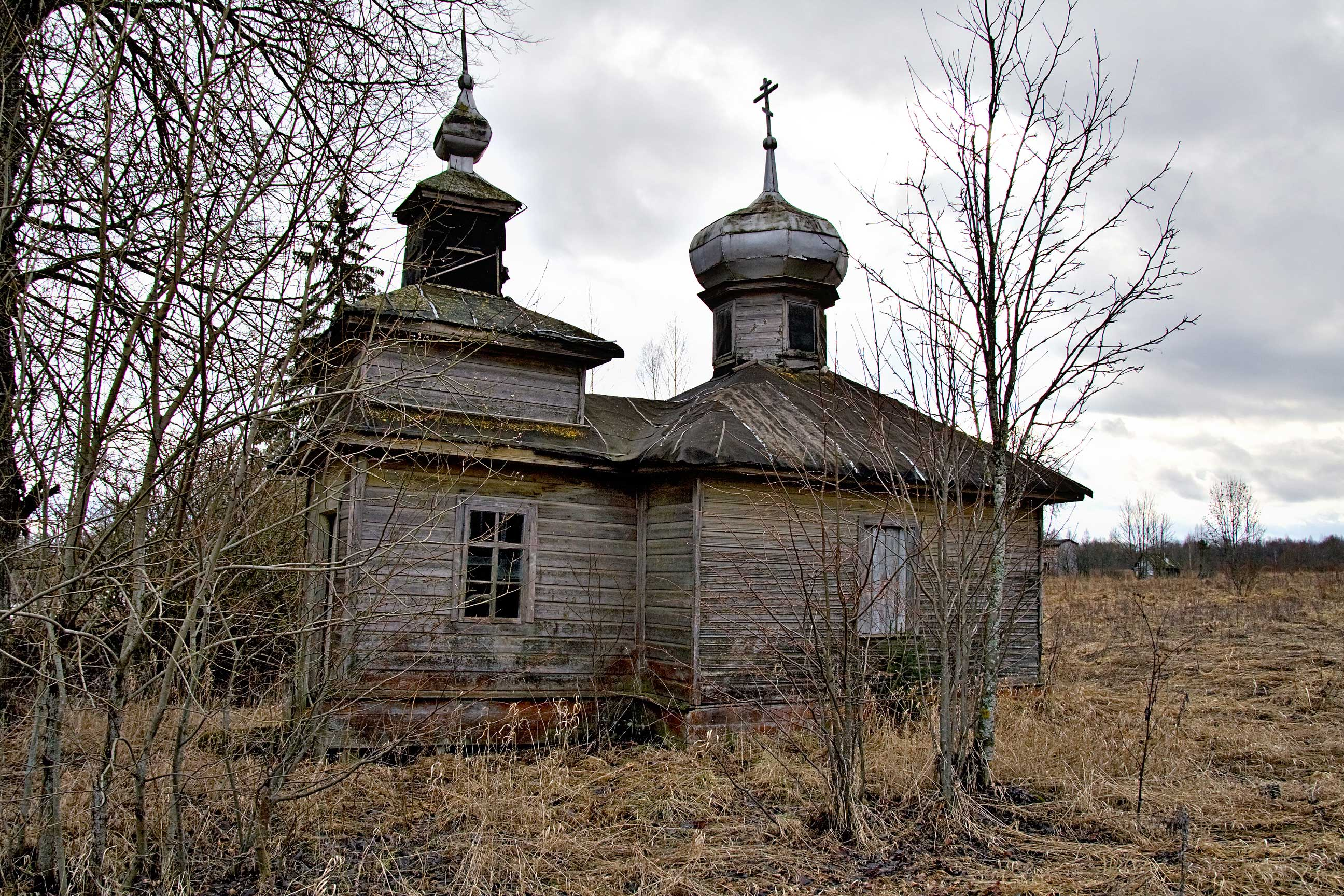 Часовня в с. Вольные Кусони. Vol'nye Kusoni, chapel.